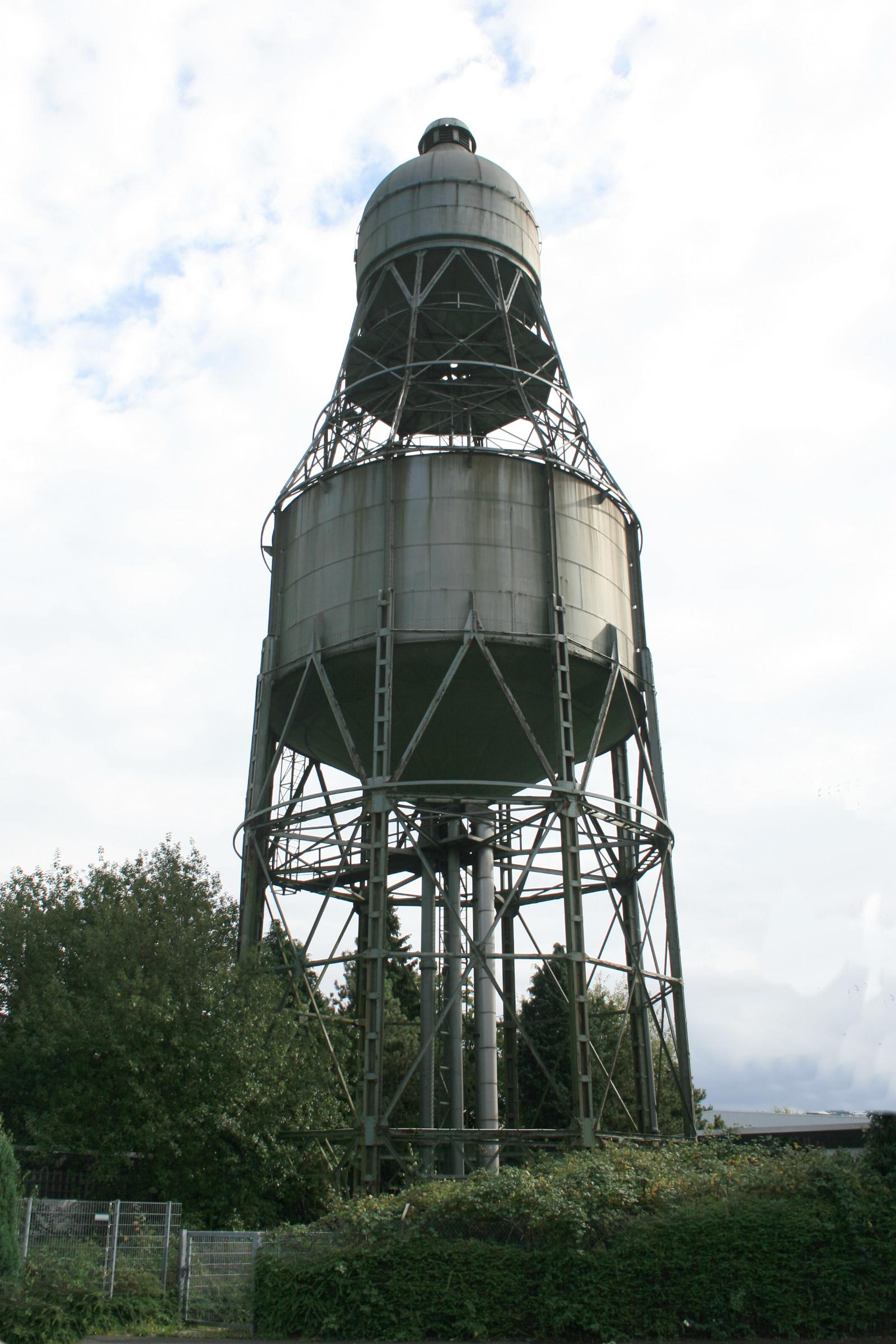 Wasserturm in Oed